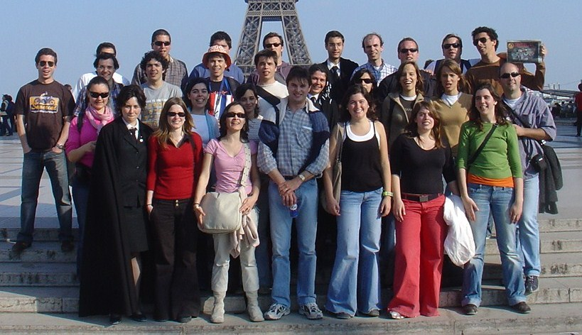 L'Orphéon Académique de Coimbra à Paris en 2006.